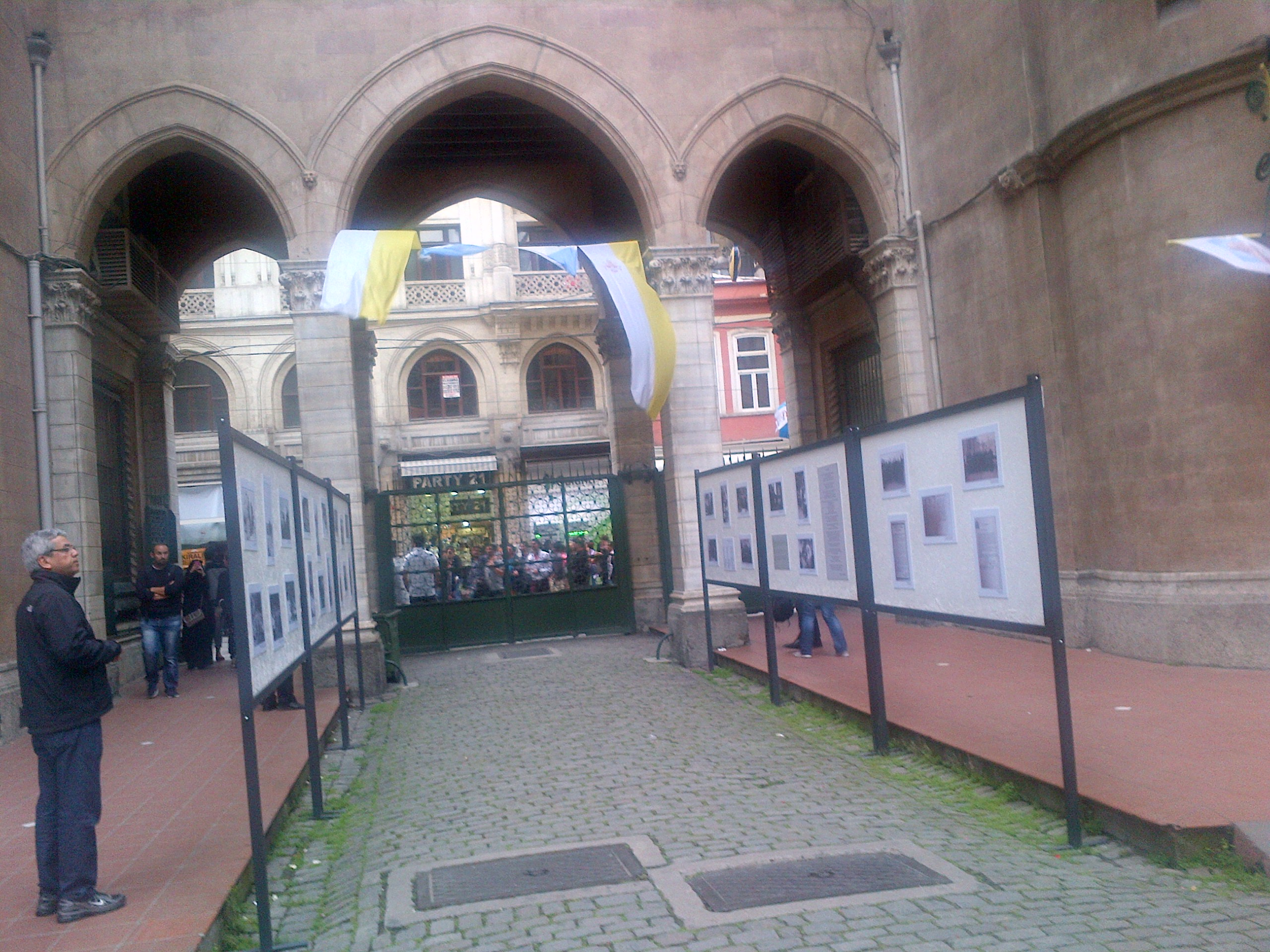 Una exposicion, en junio de 2014 para conmemorar al Papa Juan 23 en la Iglesia de San Antonio, En Estambul, Turquia.